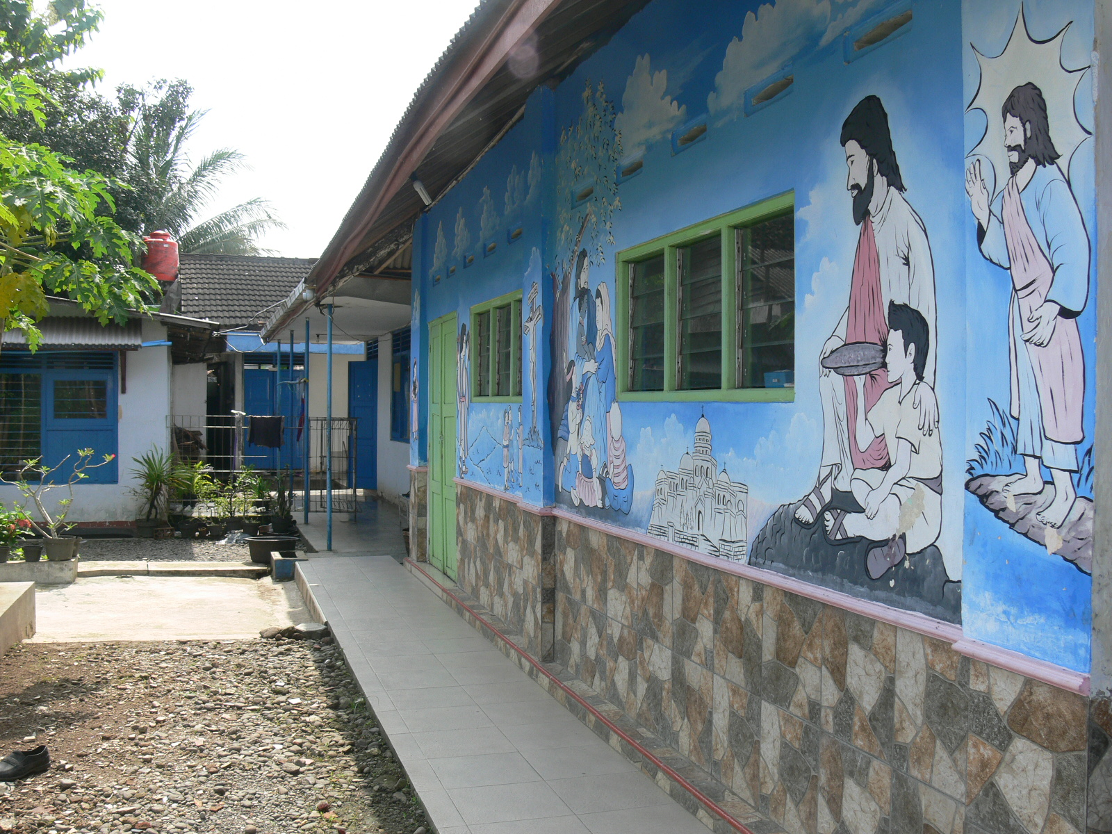 Gedung Asrama Putri